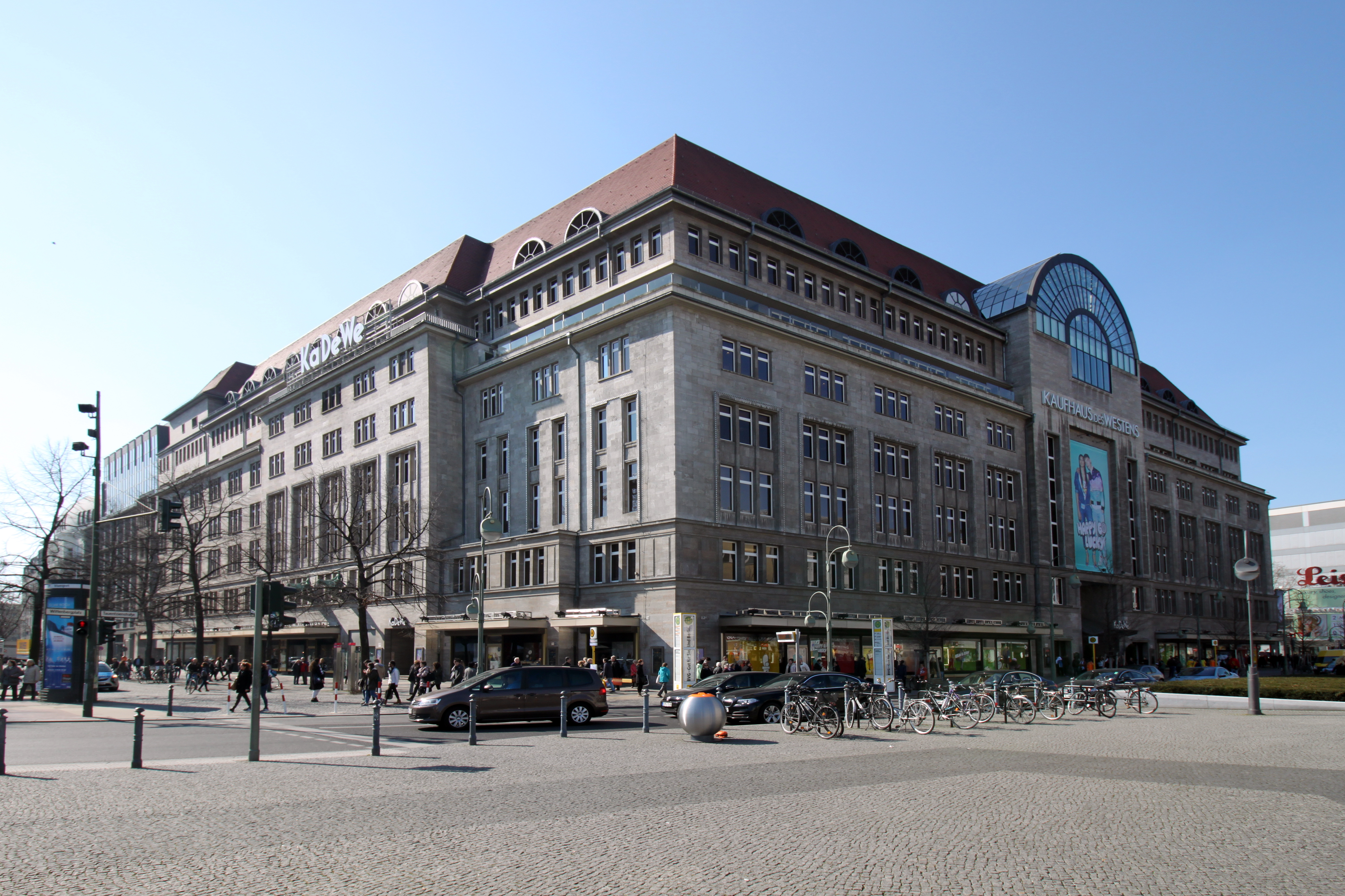 Berlin: KaDeWe (Kaufhaus des Westens)